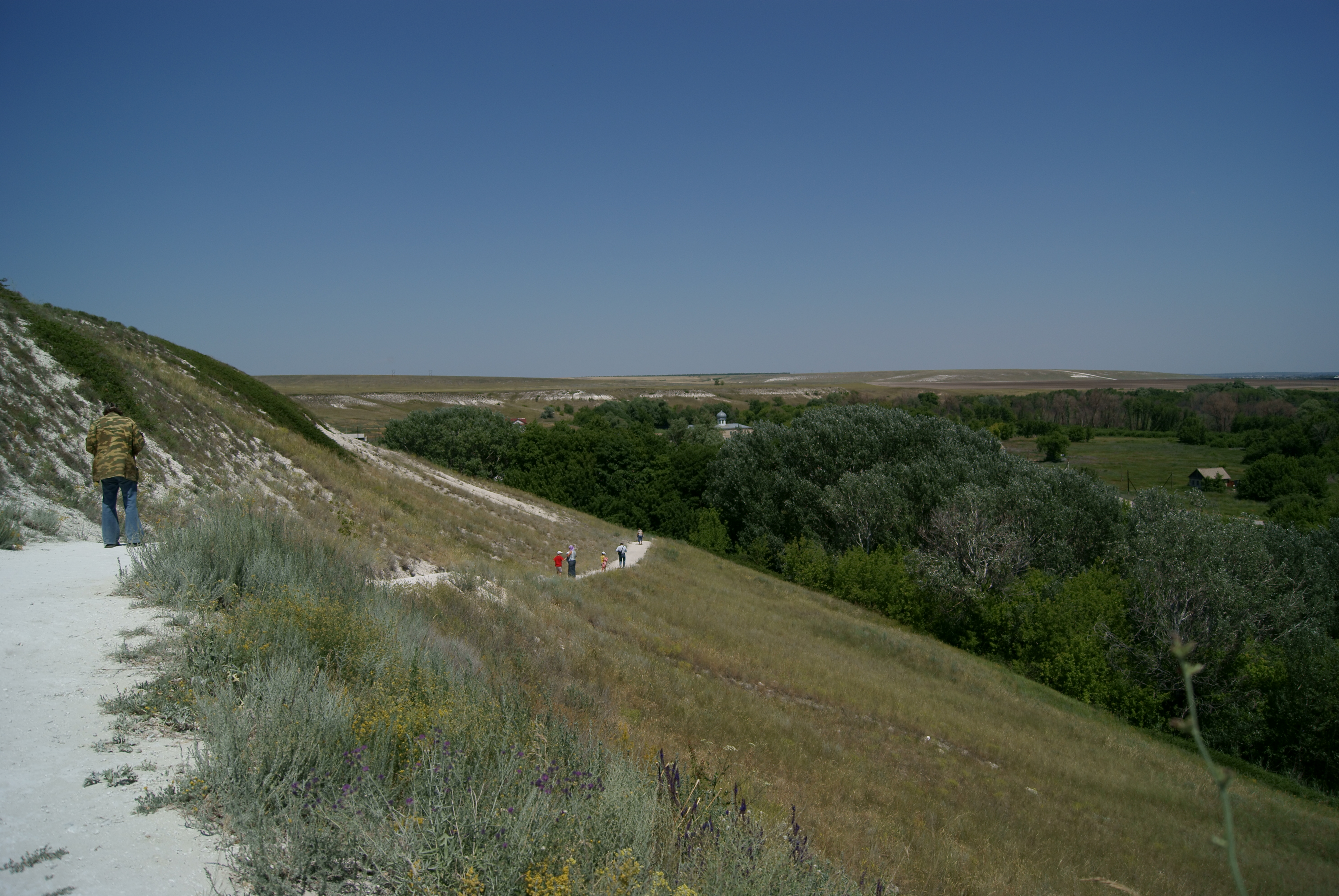 Белогорский Свято-Троицкий Каменнобродский монастырь, Ольховский район This image is related to the protected area of Russia number 3410318